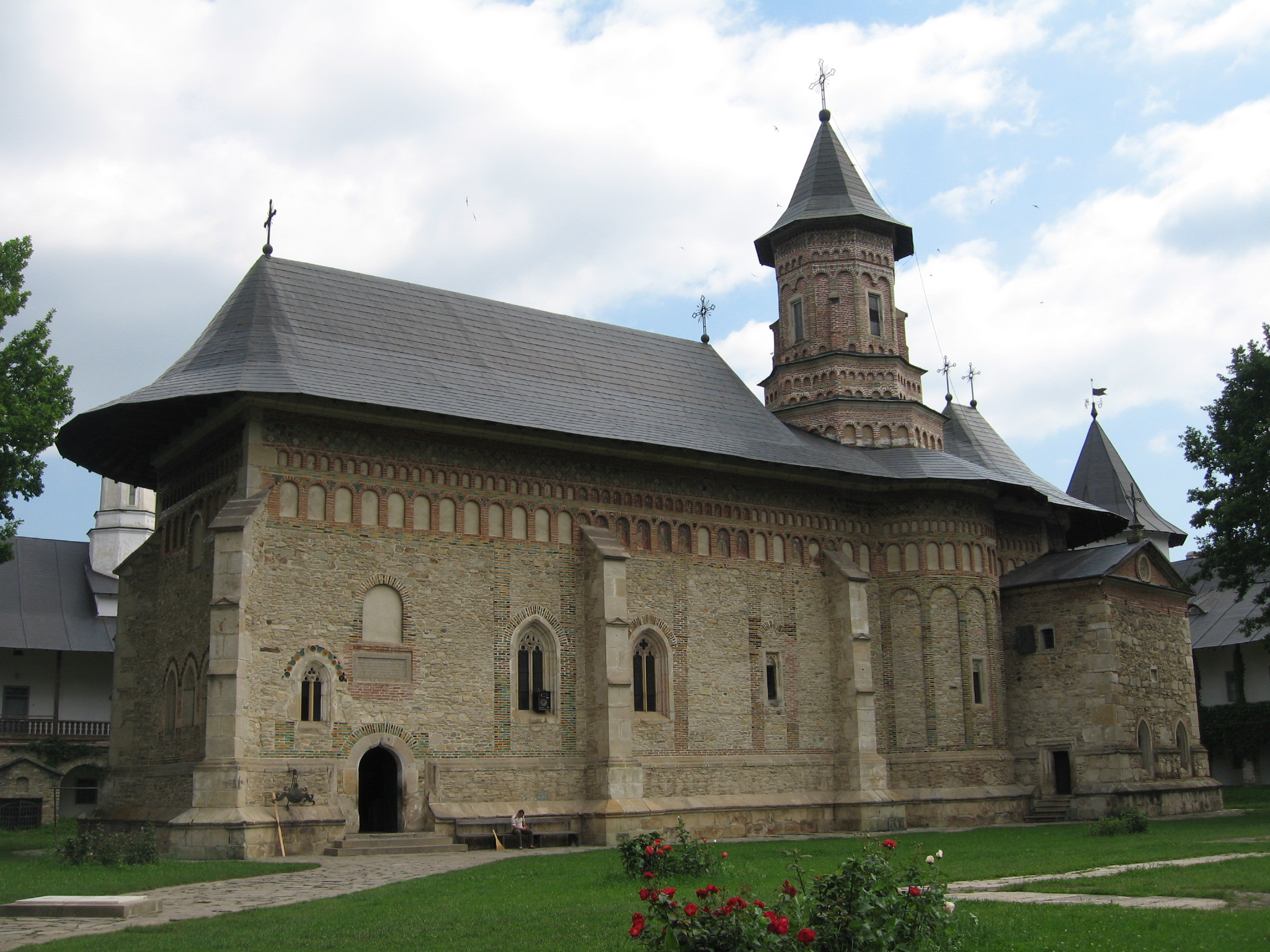 Biserica Mănăstirii Neamţ Autor:Cezar Suceveanu 01